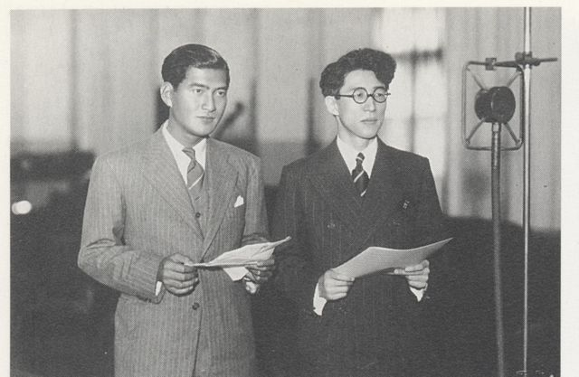 1938年発売の「上海の街角で」の宣伝用スチールをスキャン